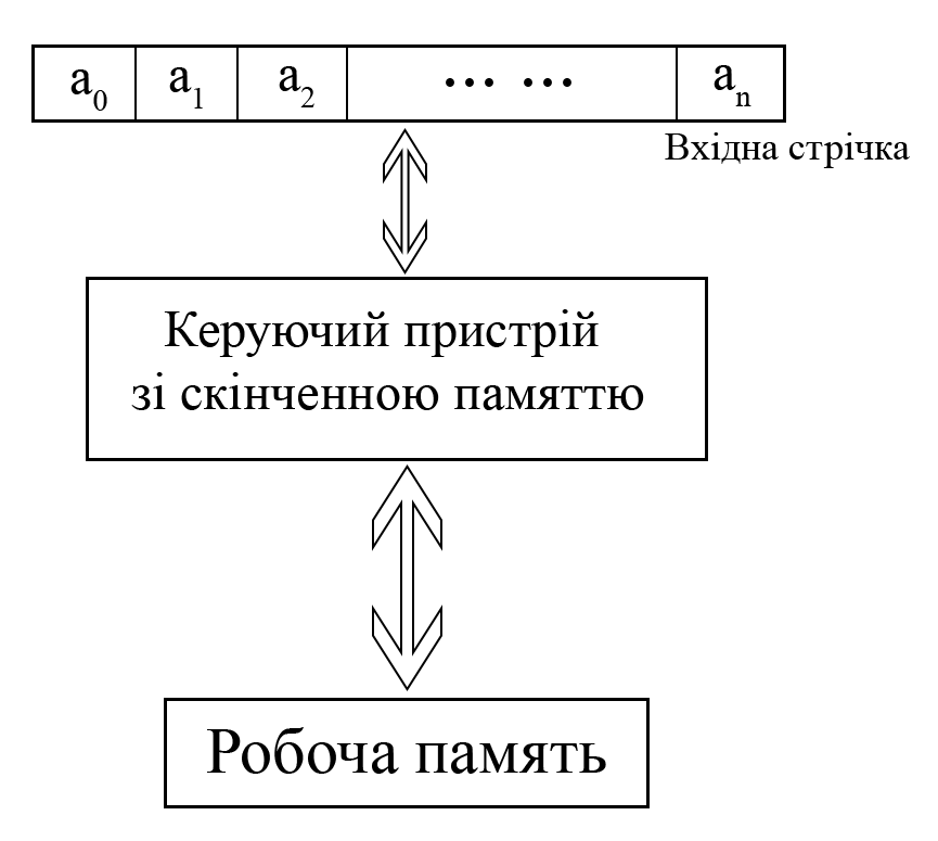 Схема автомата(дискретна математика)